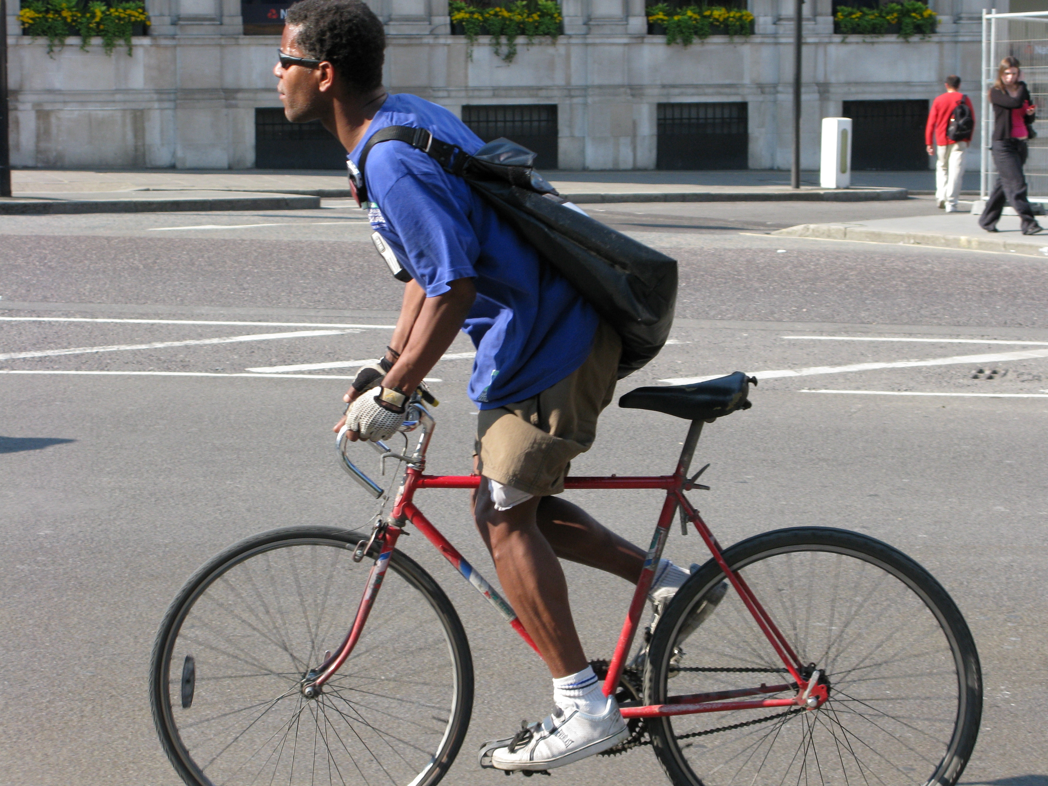 London bicycle courier